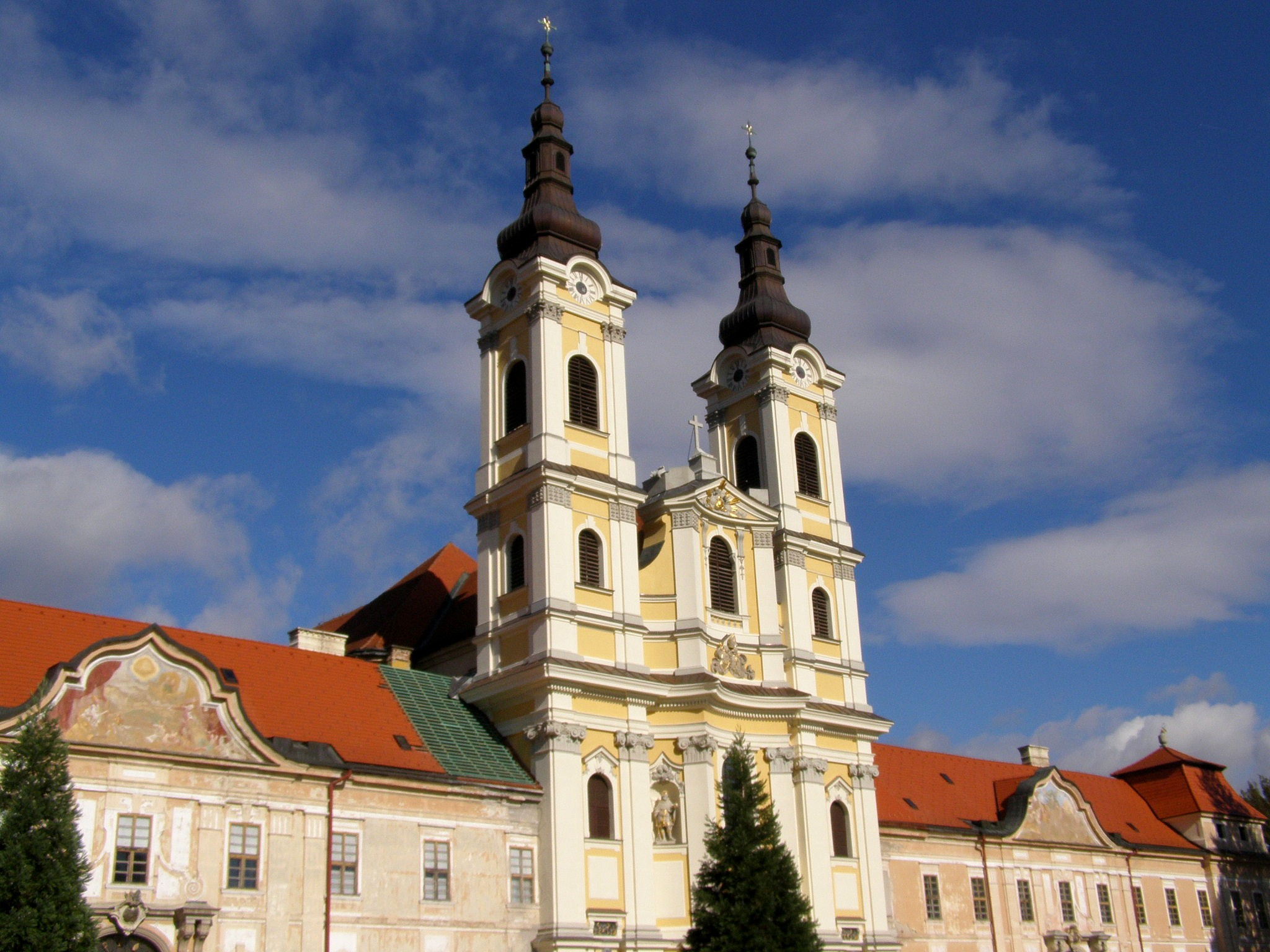 Celkový pohľad na Kostol svätého Jána Krstiteľa v Jasove a budovy kláštora premonštrátov od juhu Object location48° 40′ 55.92″ N, 20° 58′ 01.92″ E